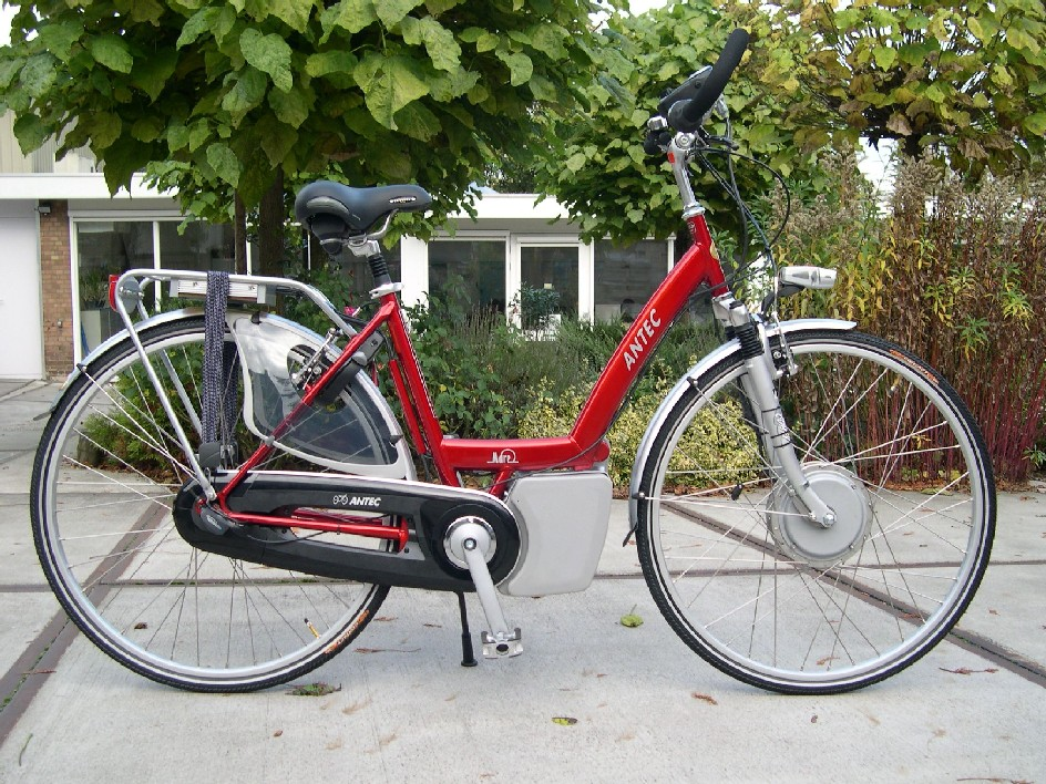 Antec Mare 2000